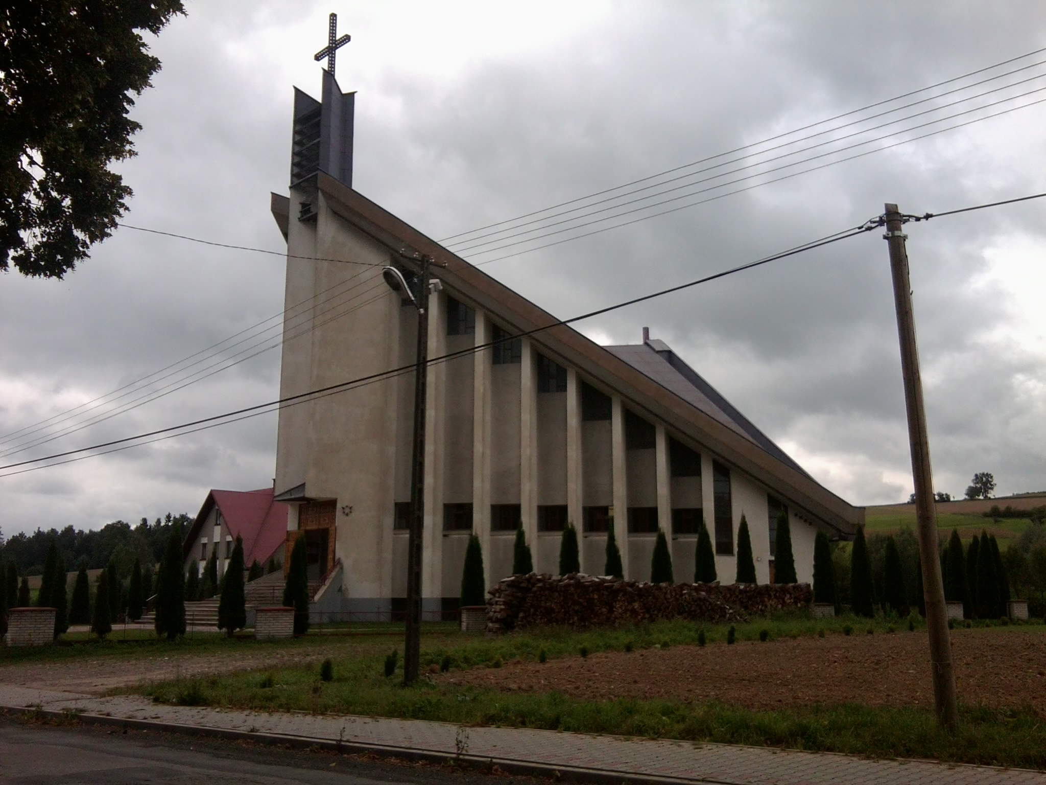 Kościół Nawiedzenia Najświętszej Maryi Panny w Długołęce-Świerkli